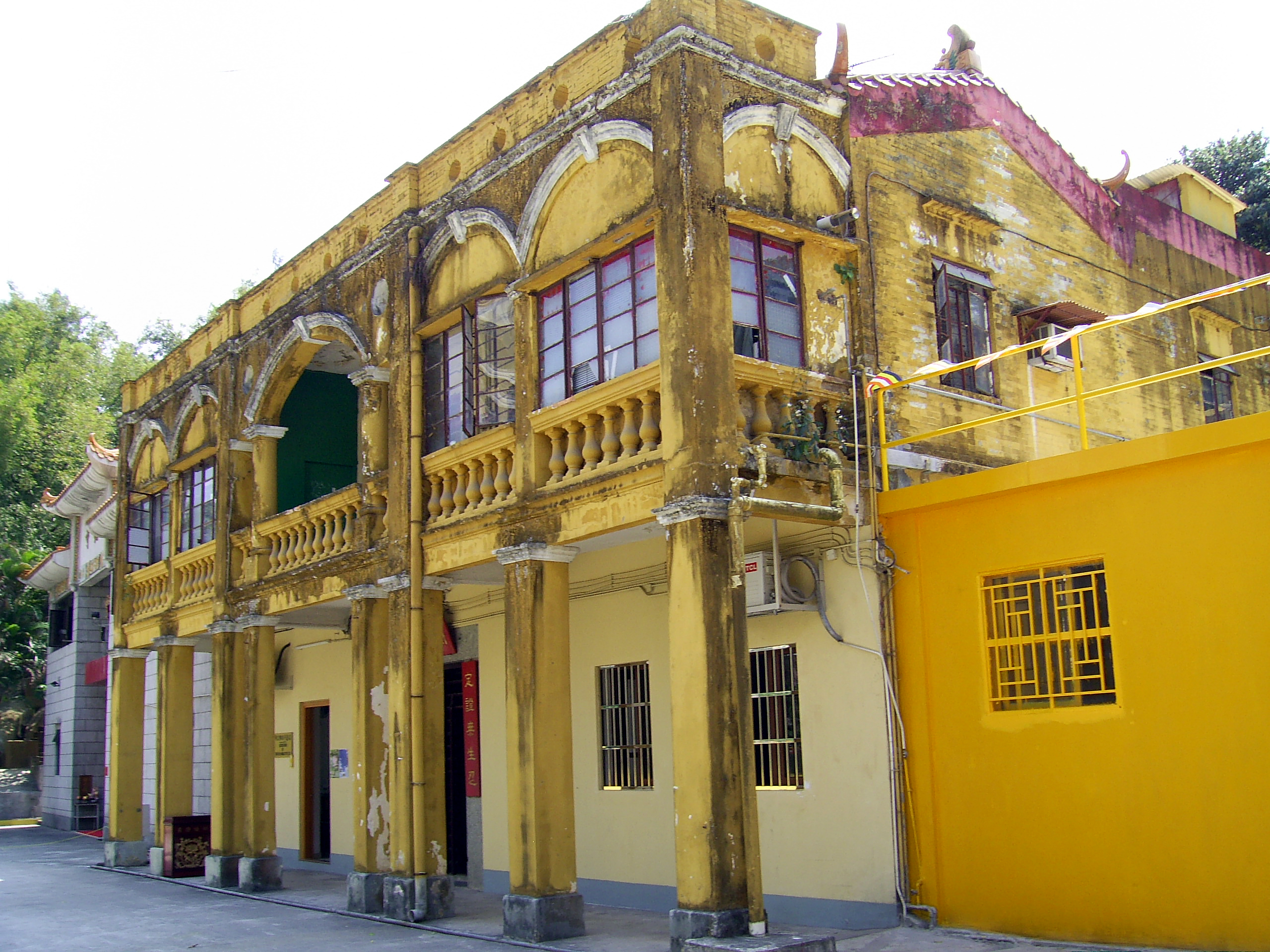 中文（香港）: 定慧寺蘭若園